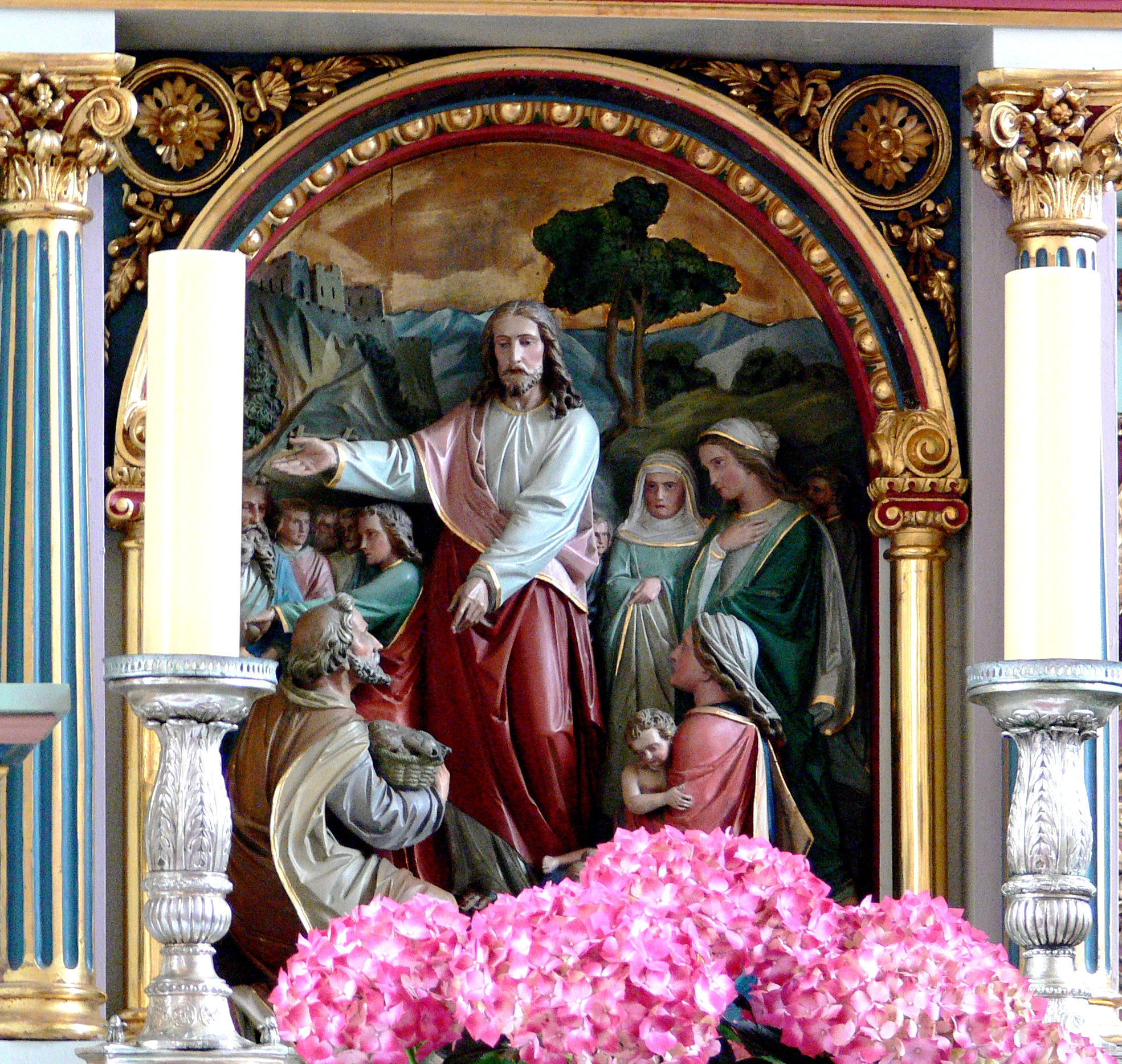 Kath. Pfarrkirche St. Gordian und Epimachus, Merazhofen, Stadt Leutkirch im Allgäu, Landkreis Ravensburg Hochaltar von Peter Paul Metz, 1868: Relief Brotvermehrung